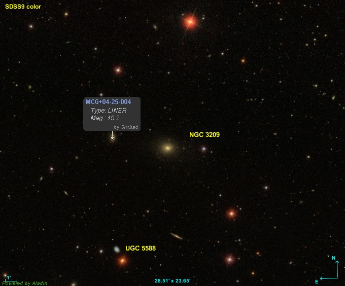 Image créée à l'aide du logiciel Aladin Sky Atlas du Centre de Données astronomiques de Strasbourg et des données publiques en format FIT de SDSS (Sloan Digital Sky Survey).